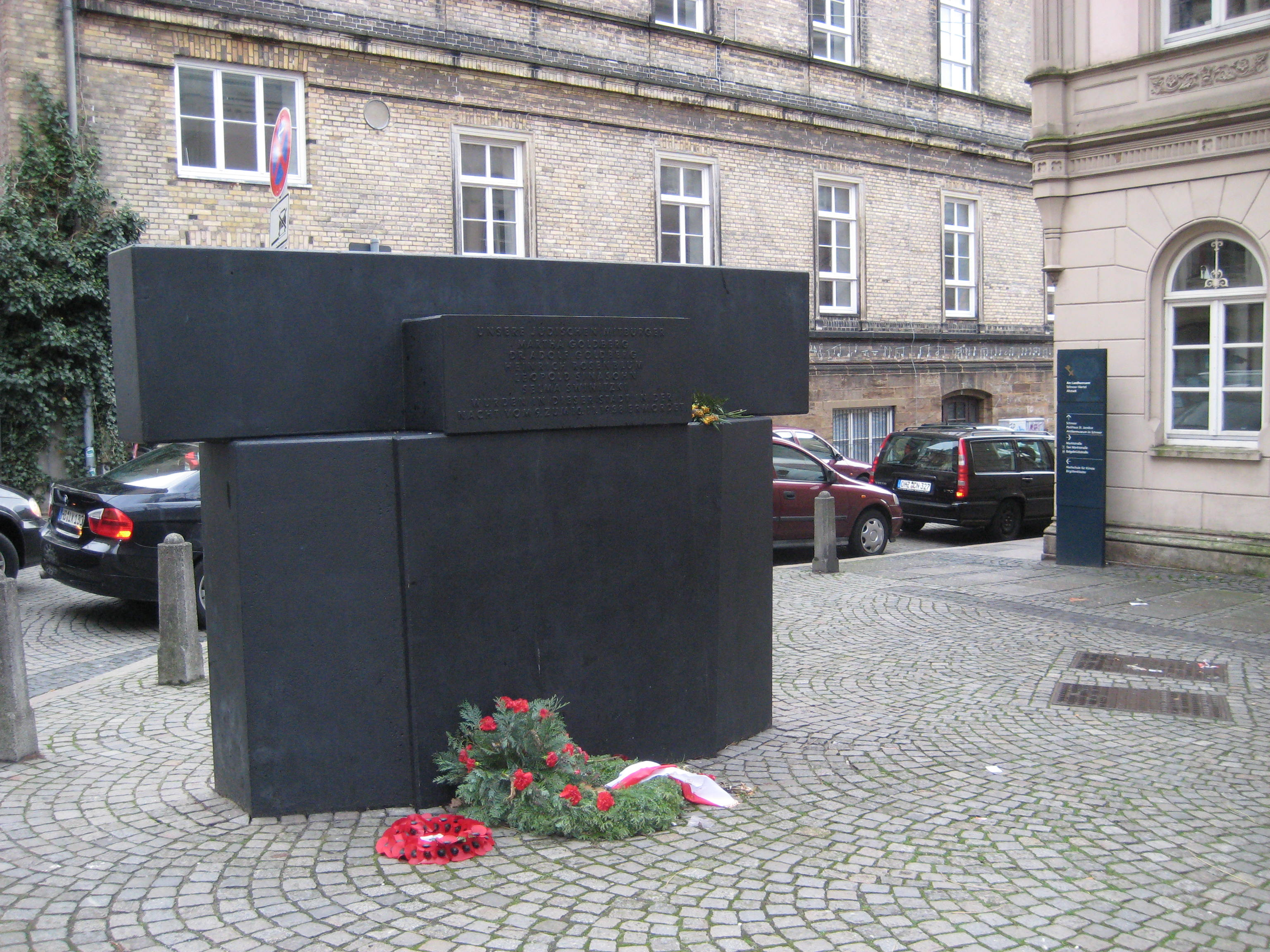 Mahnmal für die Opfer der „Reichskristallnacht“ (Reichspogromnacht) in Bremen, Deutschland. Das Mahnmal befindet sich in Bremen-Schnoorviertel, beim Haus Landherrn-Amt. Text auf der Tafel: UNSERE JÜDISCHEN MITBÜRGERMARTHA GOLDBERGDR. ADOLF GOLDBERGHEINRICH ROSENBLUMLEOPOLD SINASOHNSELMA SWINITZKIWURDEN IN DIESER STADT IN DERNACHT VOM 9. ZUM 10.11.1938 ERMORDET